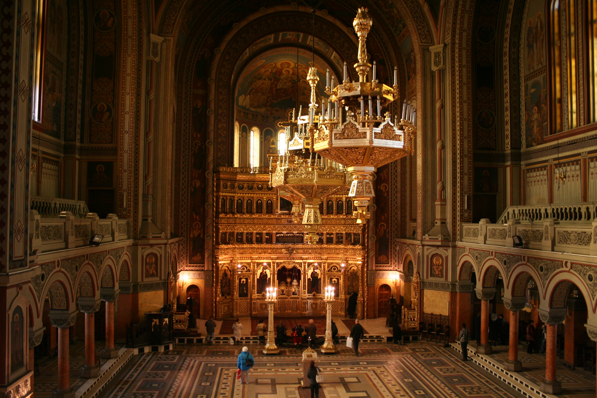 Catedrala Mitropolitană din Timişoara (interior)